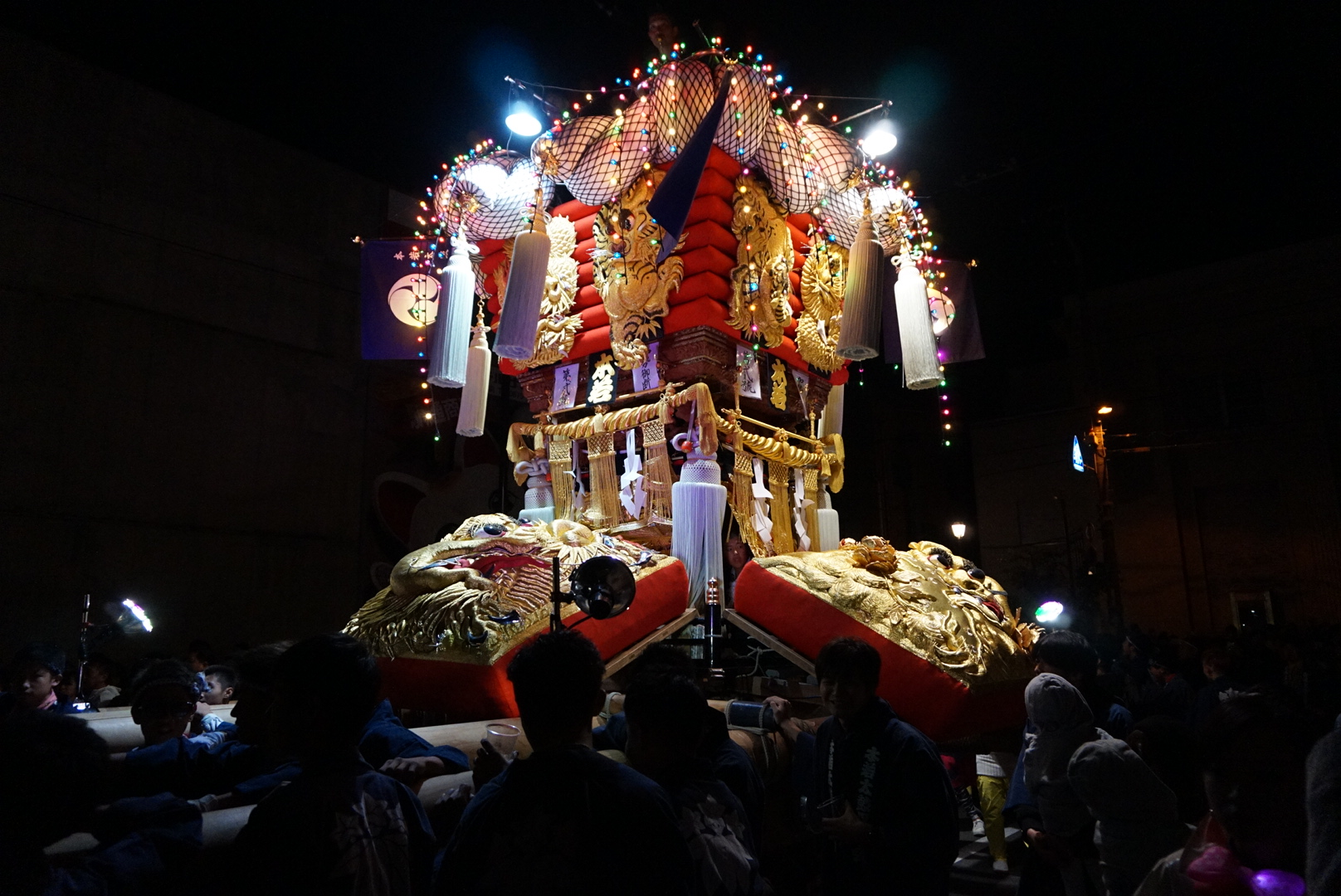 観音寺市民会館に置かれた貮號本若太鼓台